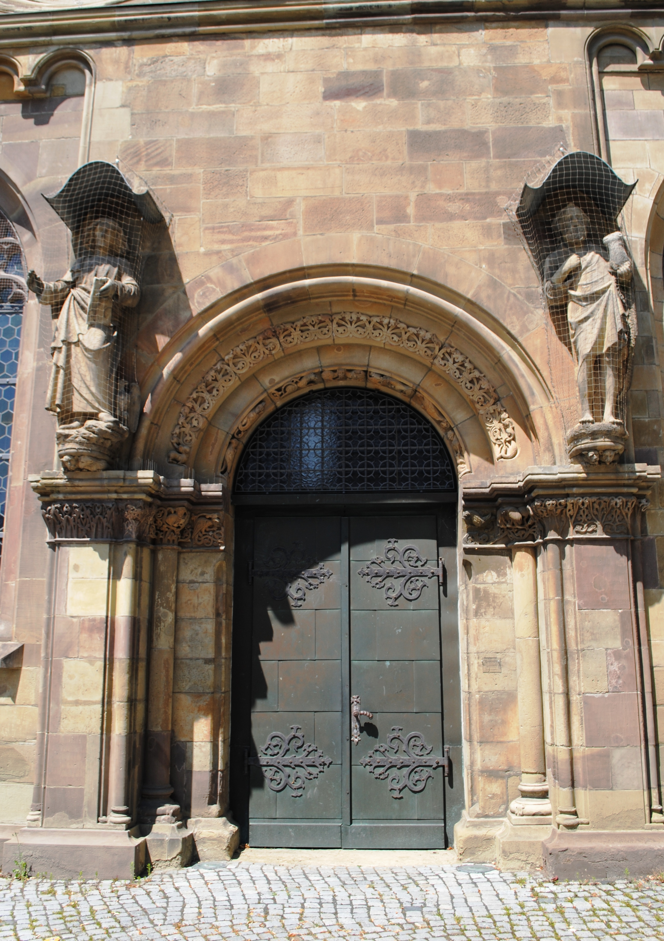 Brautportal, St. Johannis, Schweinfurt, Südseite, romanisch-gotisch, links Johannes Evangelist, rechts Johannes Baptist, Meister unbekannt